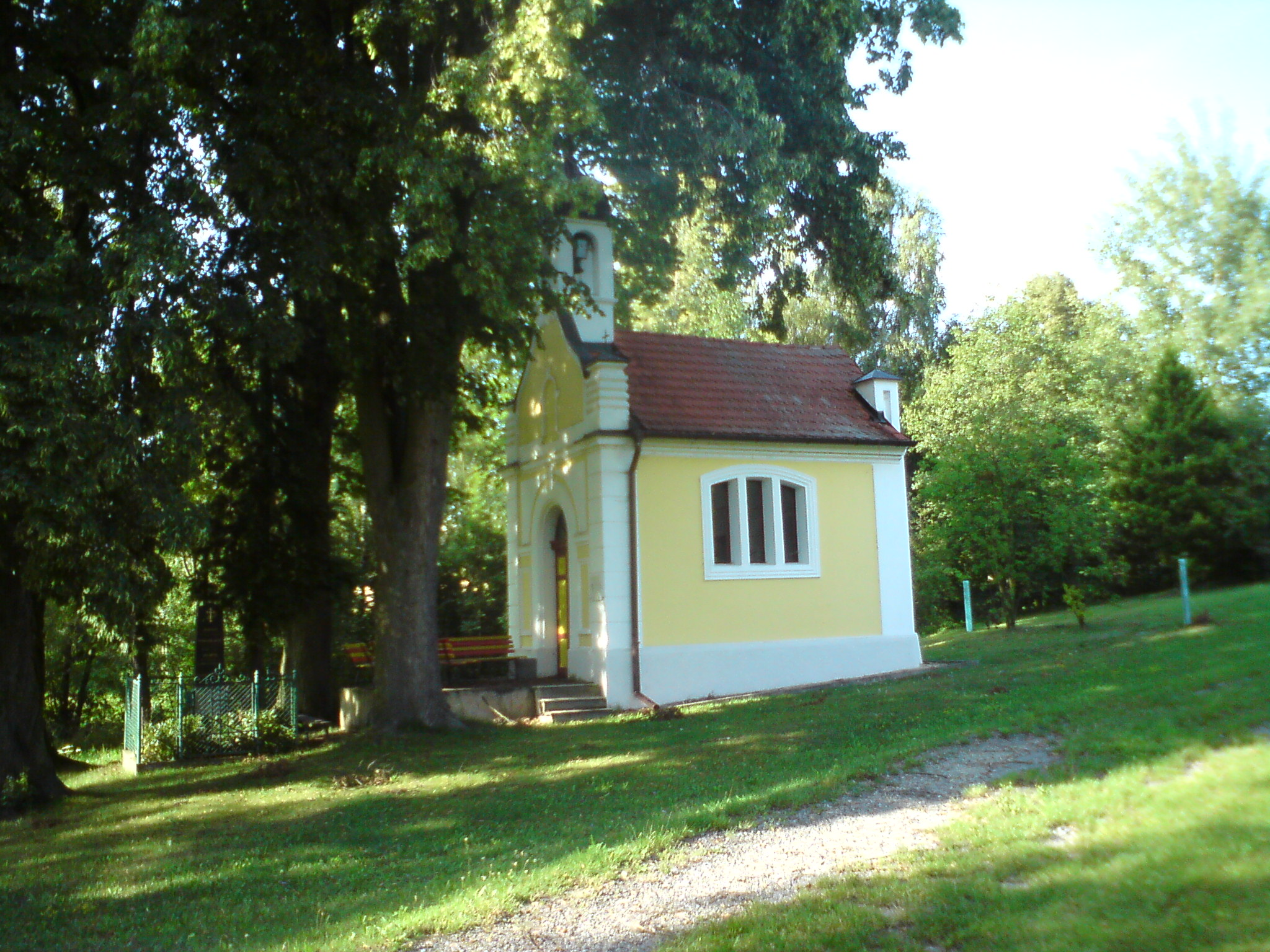 Kaple v Ohrazeníčku u Ledenic